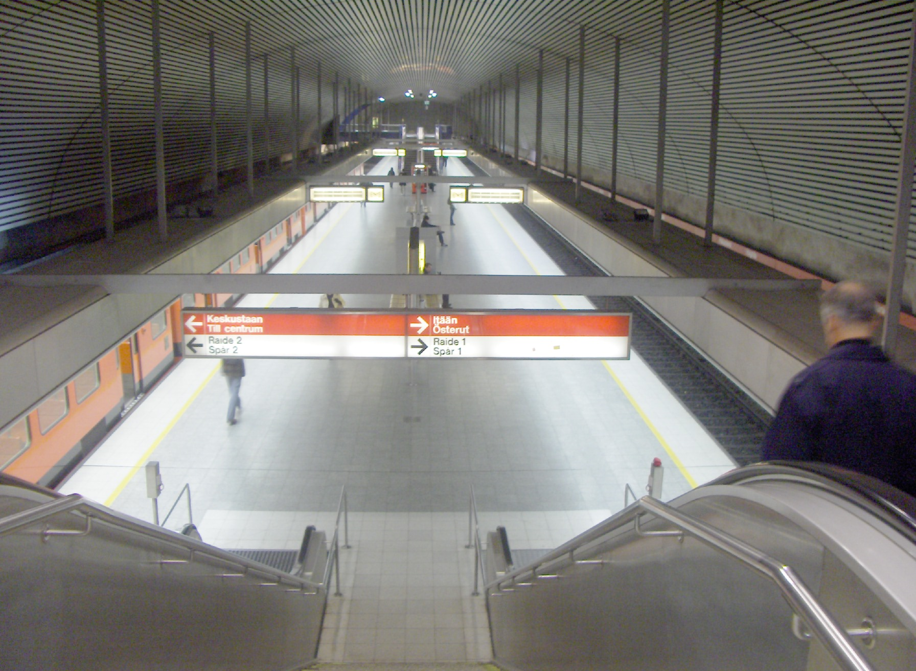 Stanice metra Hakaniemi v Helsinkách, Finsko